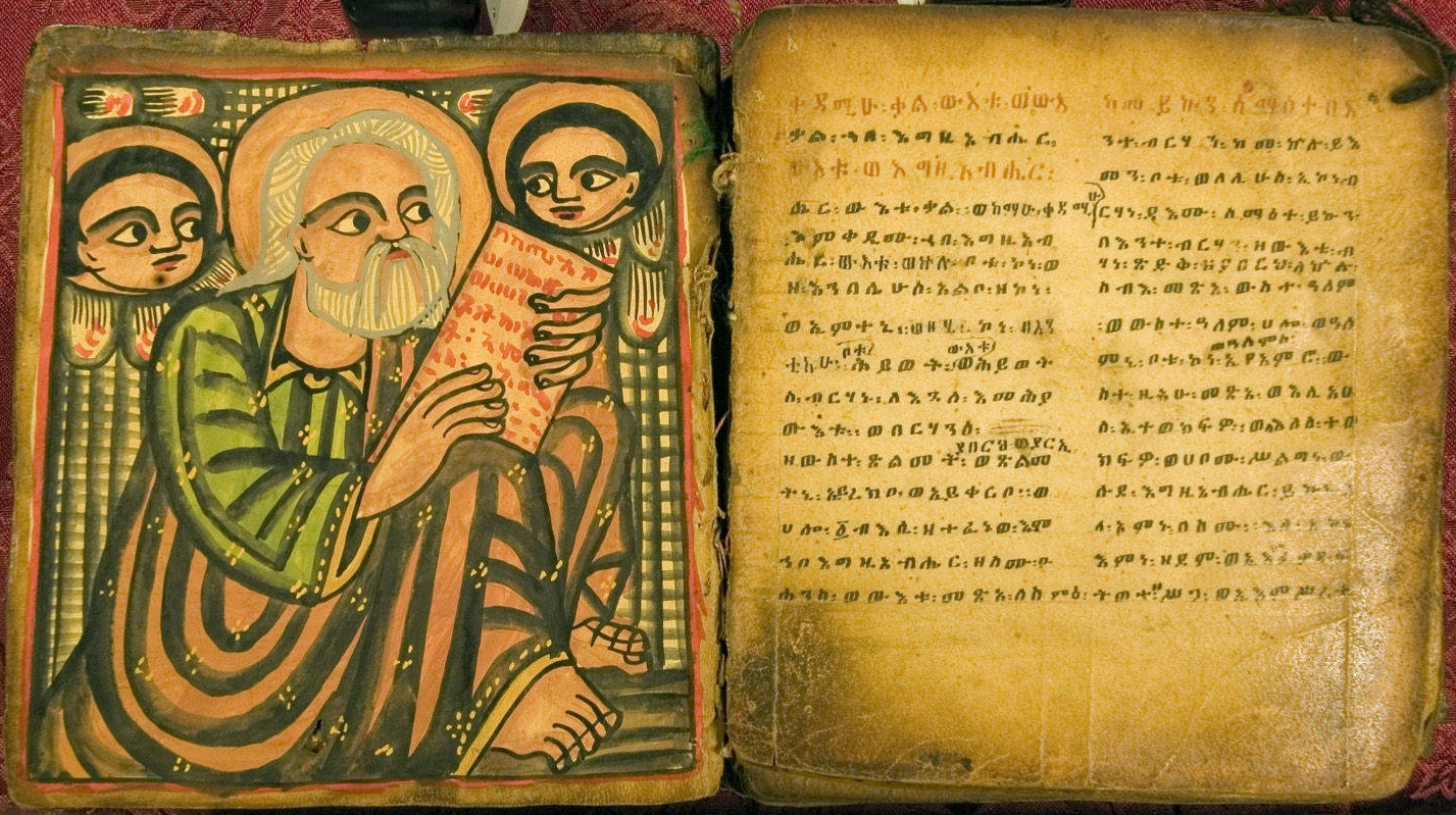 Eliza Codex 17 - Ethiopian biblical manuscript